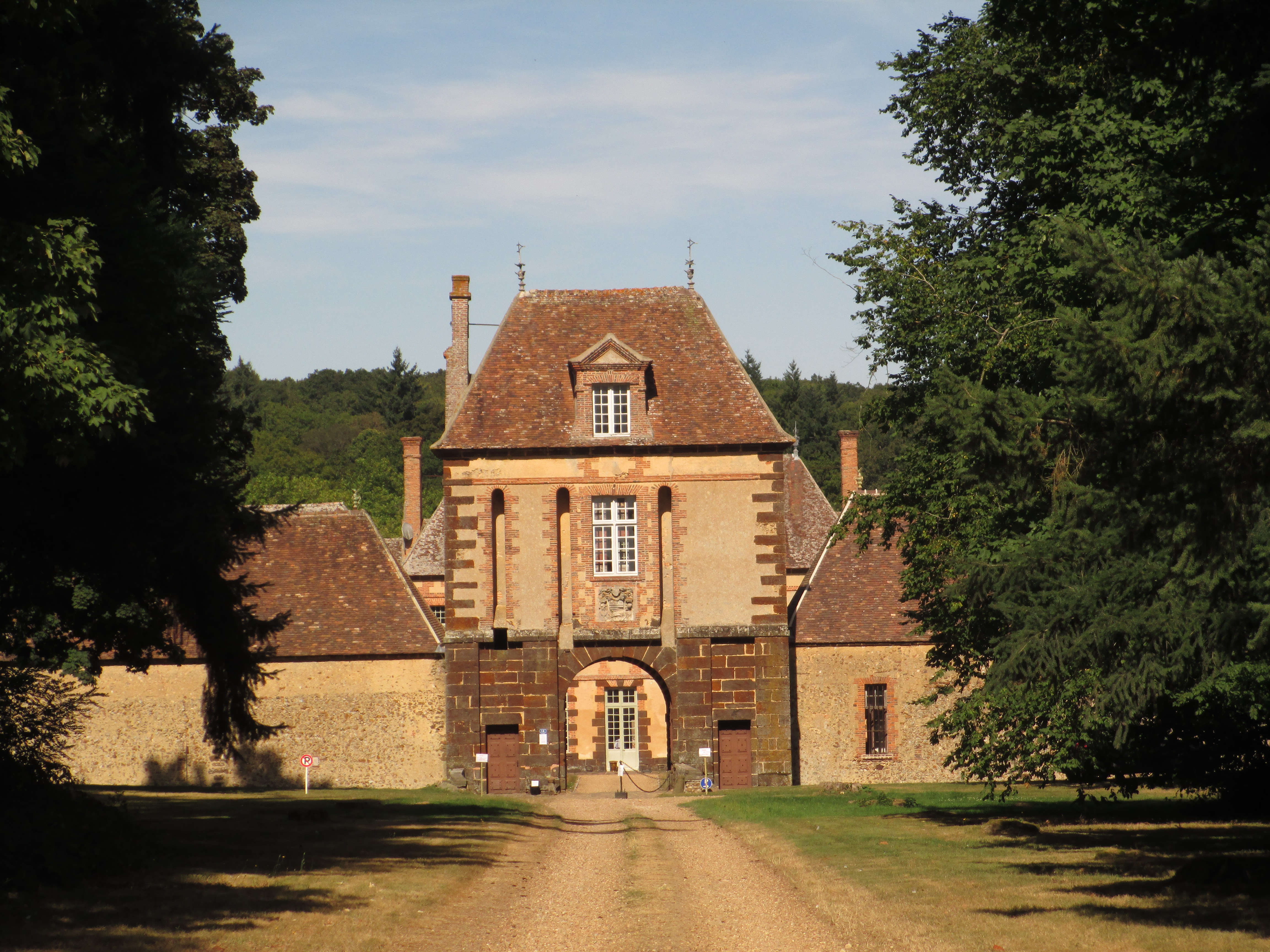 Château de la Rivière, sur la commune de Pontgouin (Eure-et-Loir). .